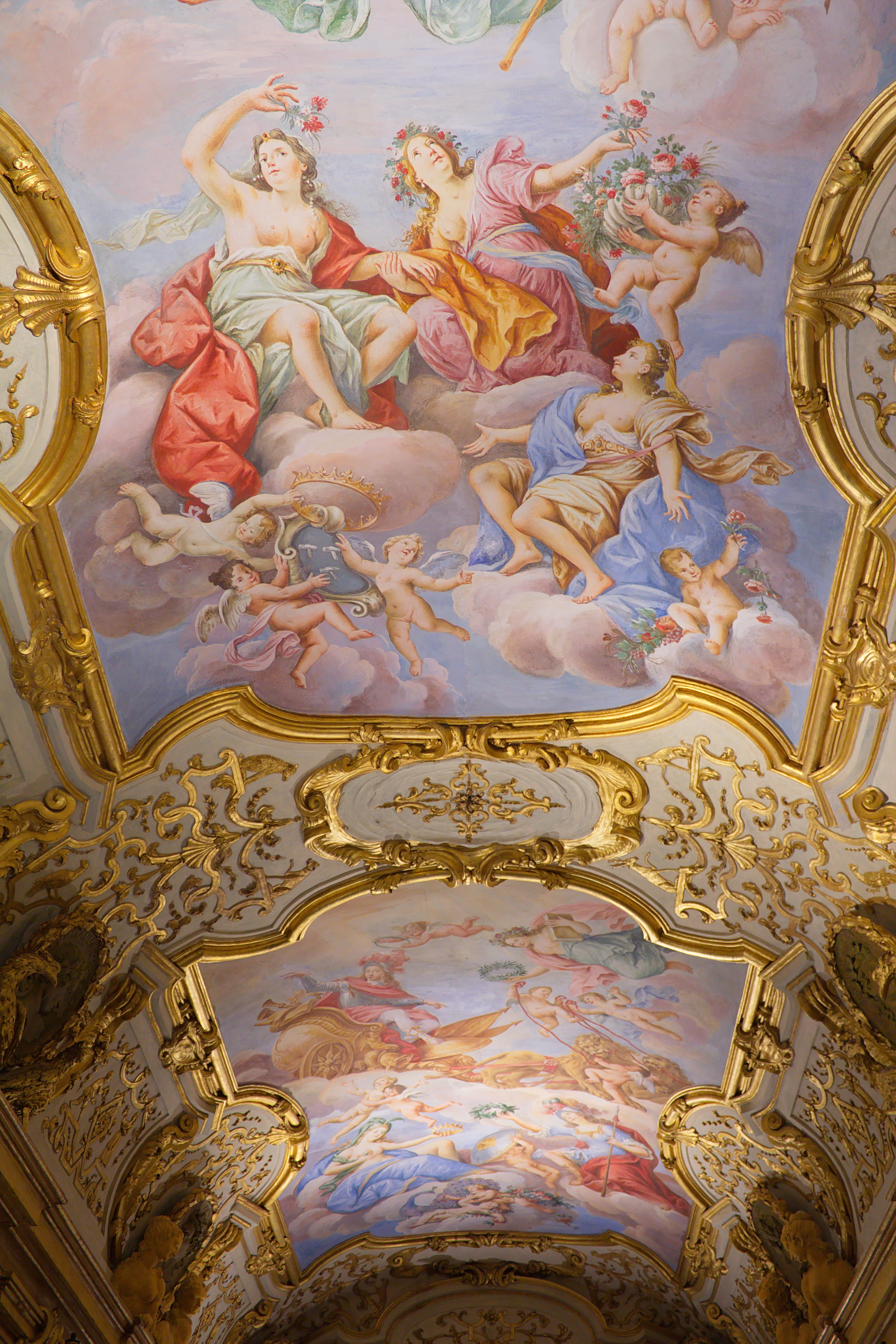 Galleria Mazzetti, Palazzo Mazzetti, Asti This is a photo of a monument which is part of cultural heritage of Italy.